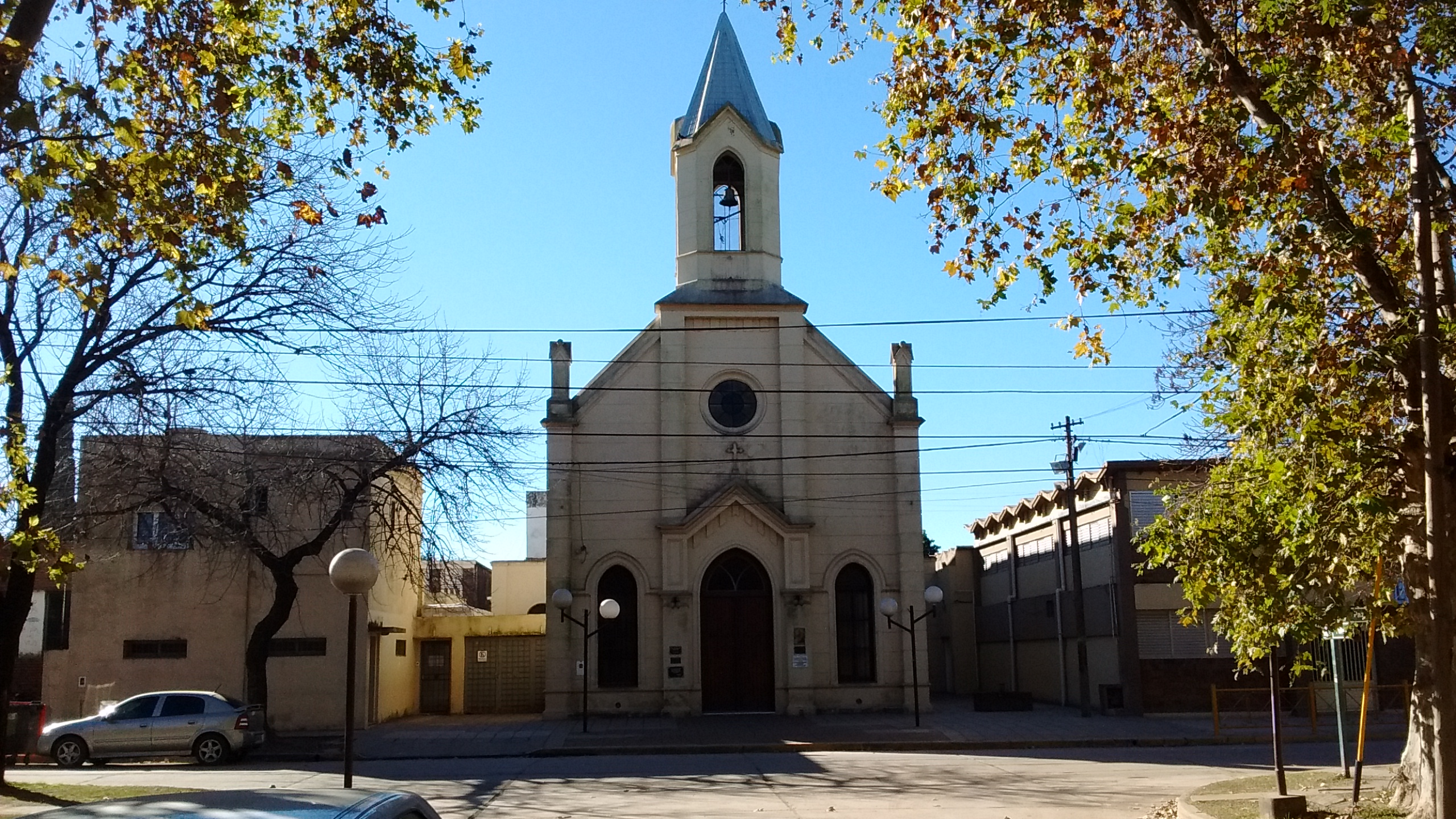 Principal iglesia de la ciudad de Funes.